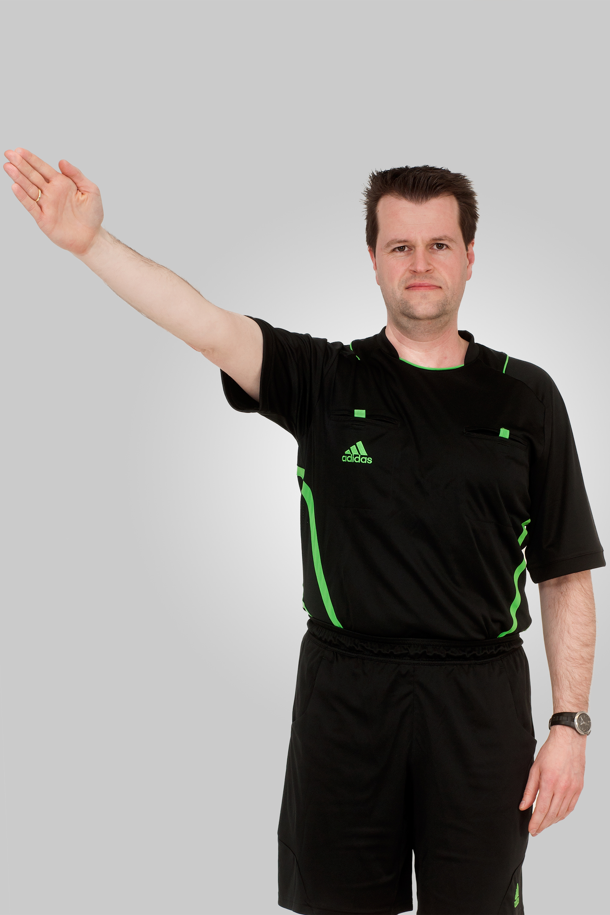 Internationale Handballregeln Handzeichen 09 Freiwurf-Richtung